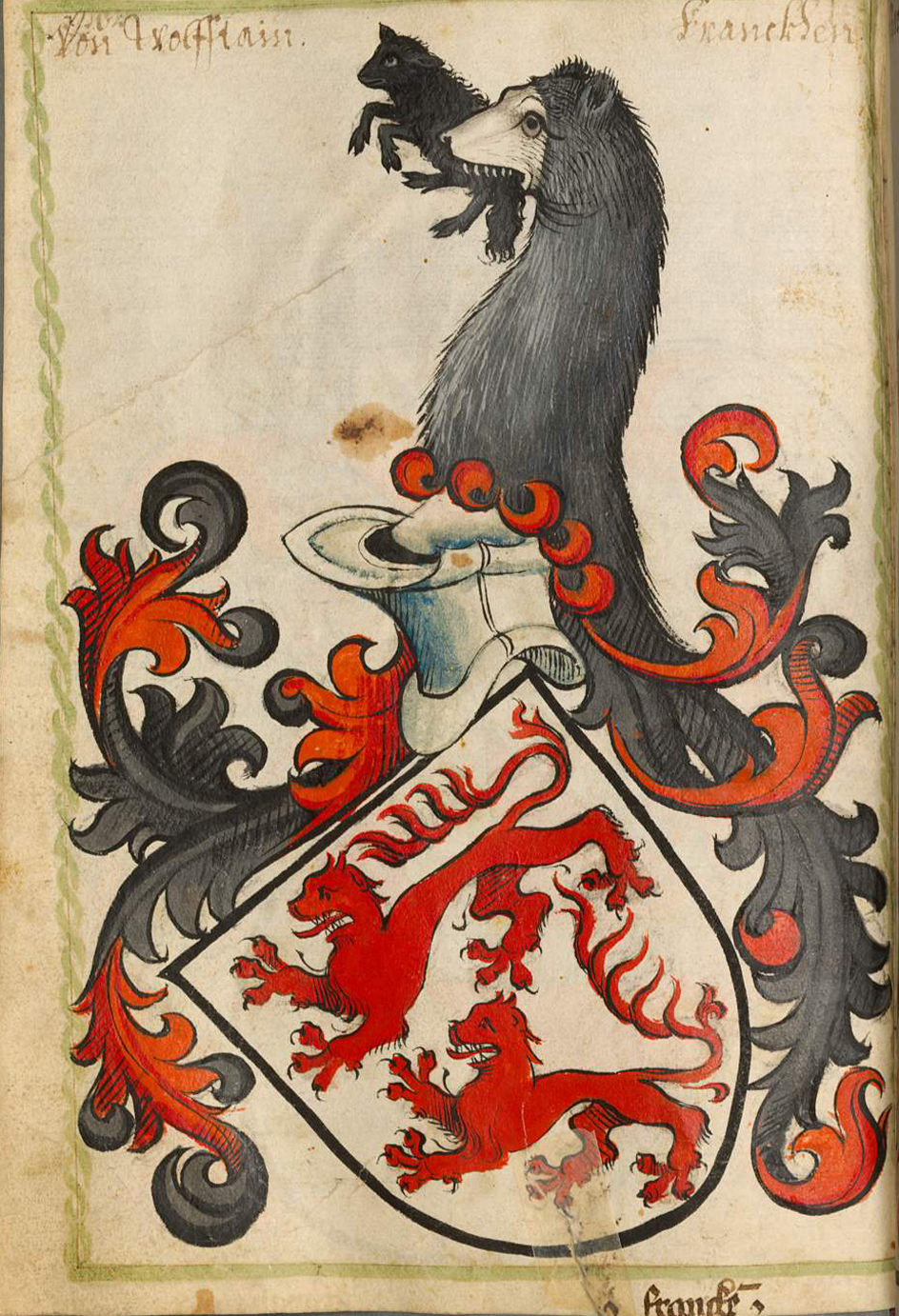 Scheibler'sches Wappenbuch , älterer Teil; Seite 162 Von Wolfstain Franken